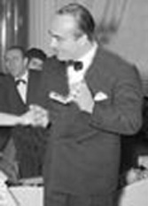 Giuseppe Amato, réalisateur italie (1899-1964)